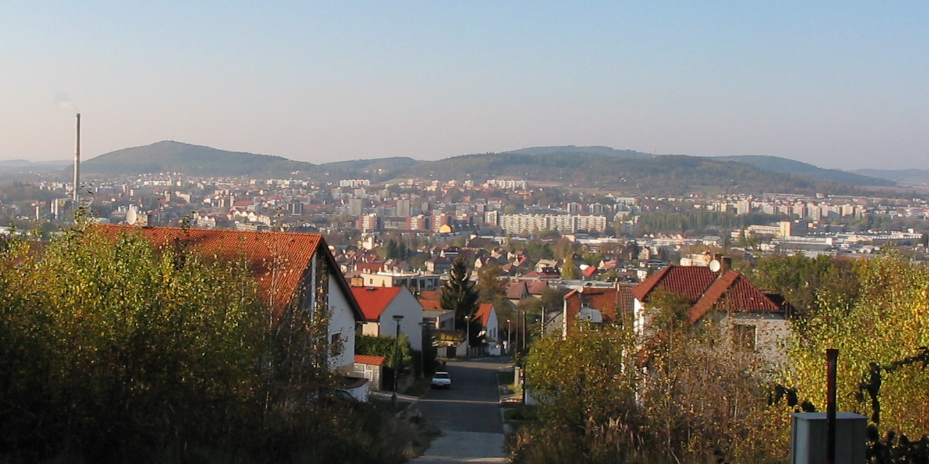 A view of Strakonice from hill Podsrp - pohled na Strakonice z kopce Podsrp